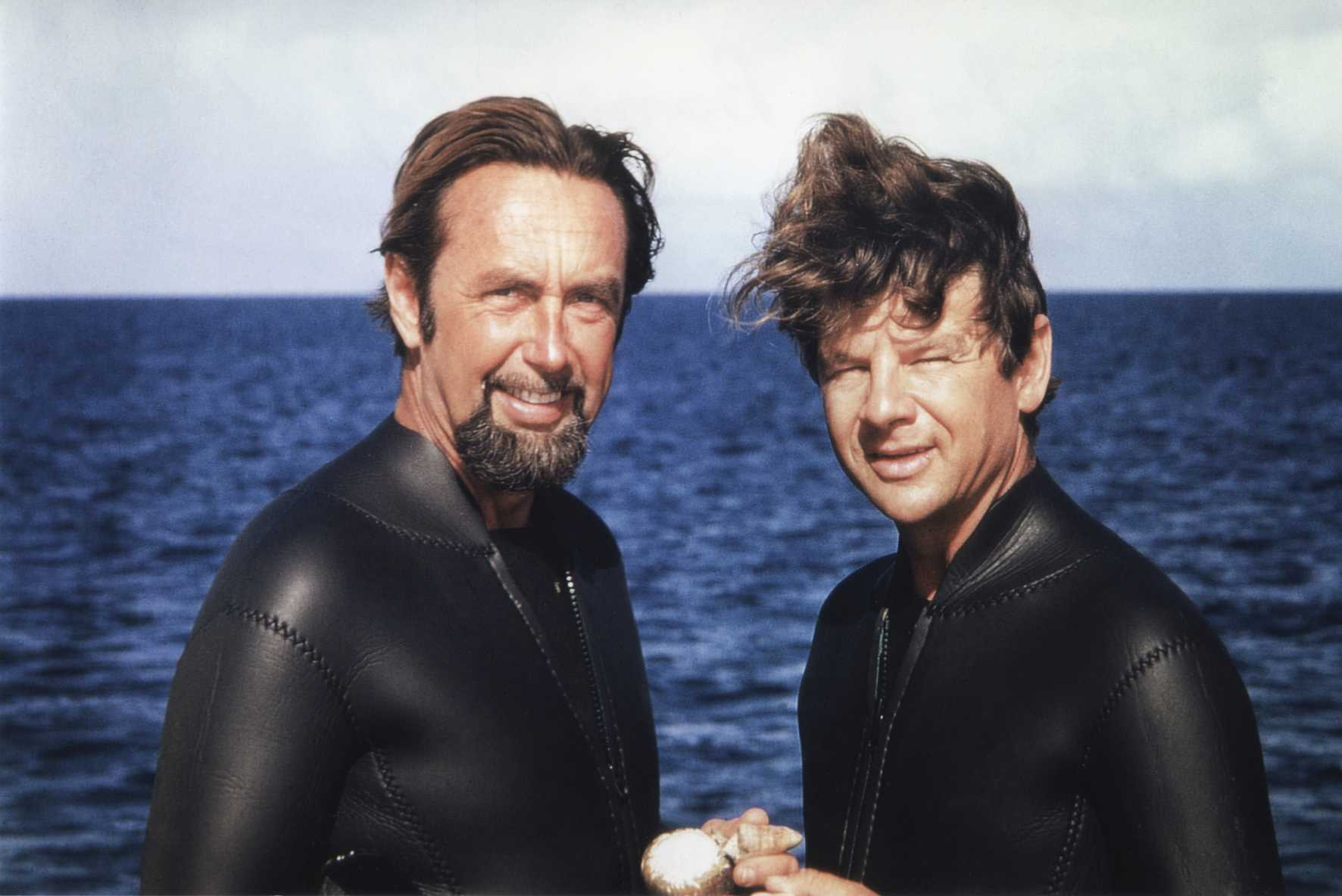 Die Biologen Hans Hass (links) und Eibl-Eibesfeld (rechts)